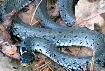 Zaskroniec; autor Dixi ; licencja PD